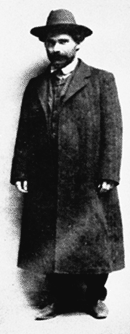 Sergey Degayev